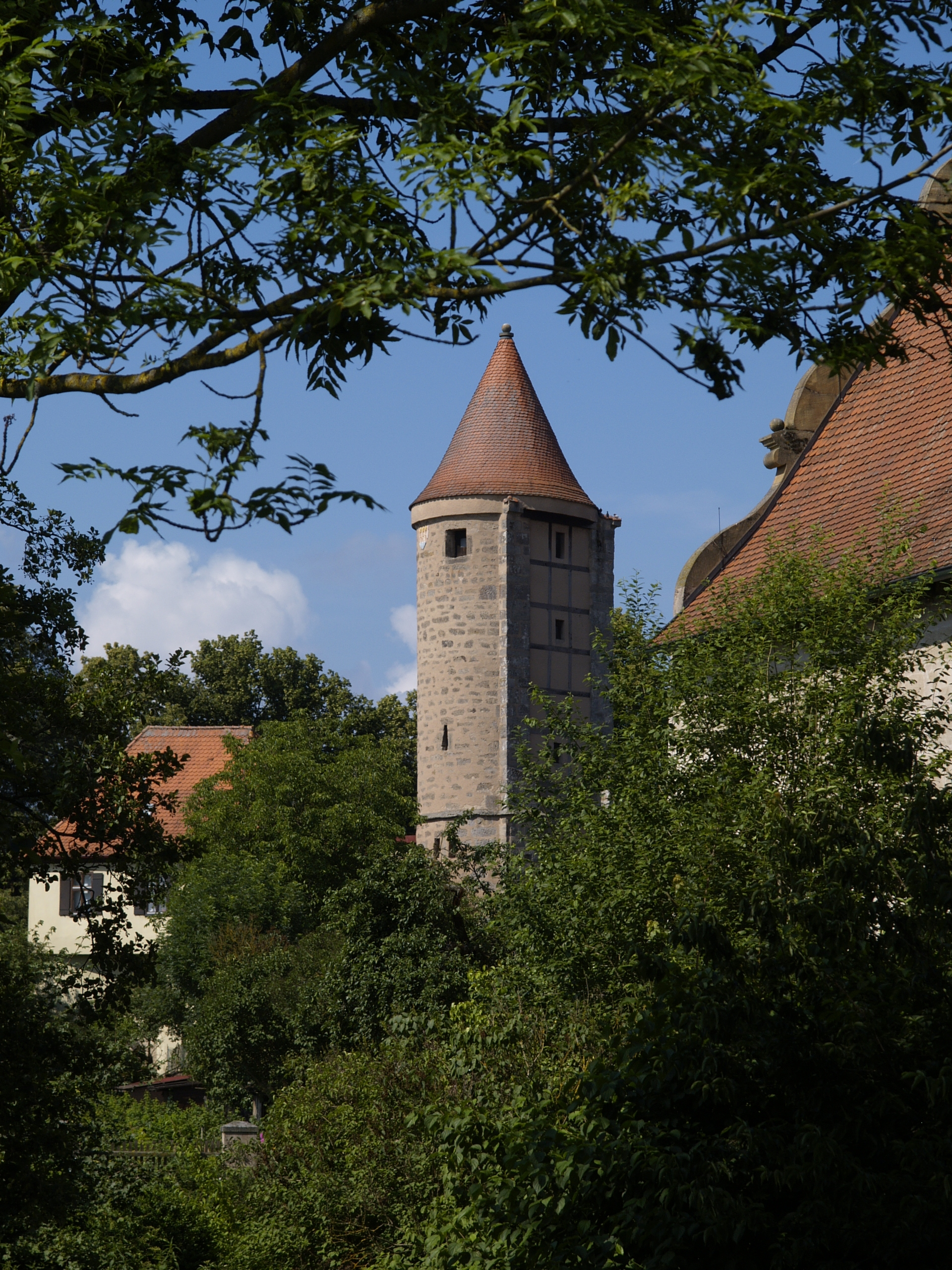 Dinkelsbühl: Salwartenturm